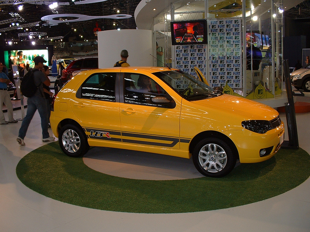 Fiat Palio 1.8R - Salão Internacional do Automóvel 2006, São Paulo.